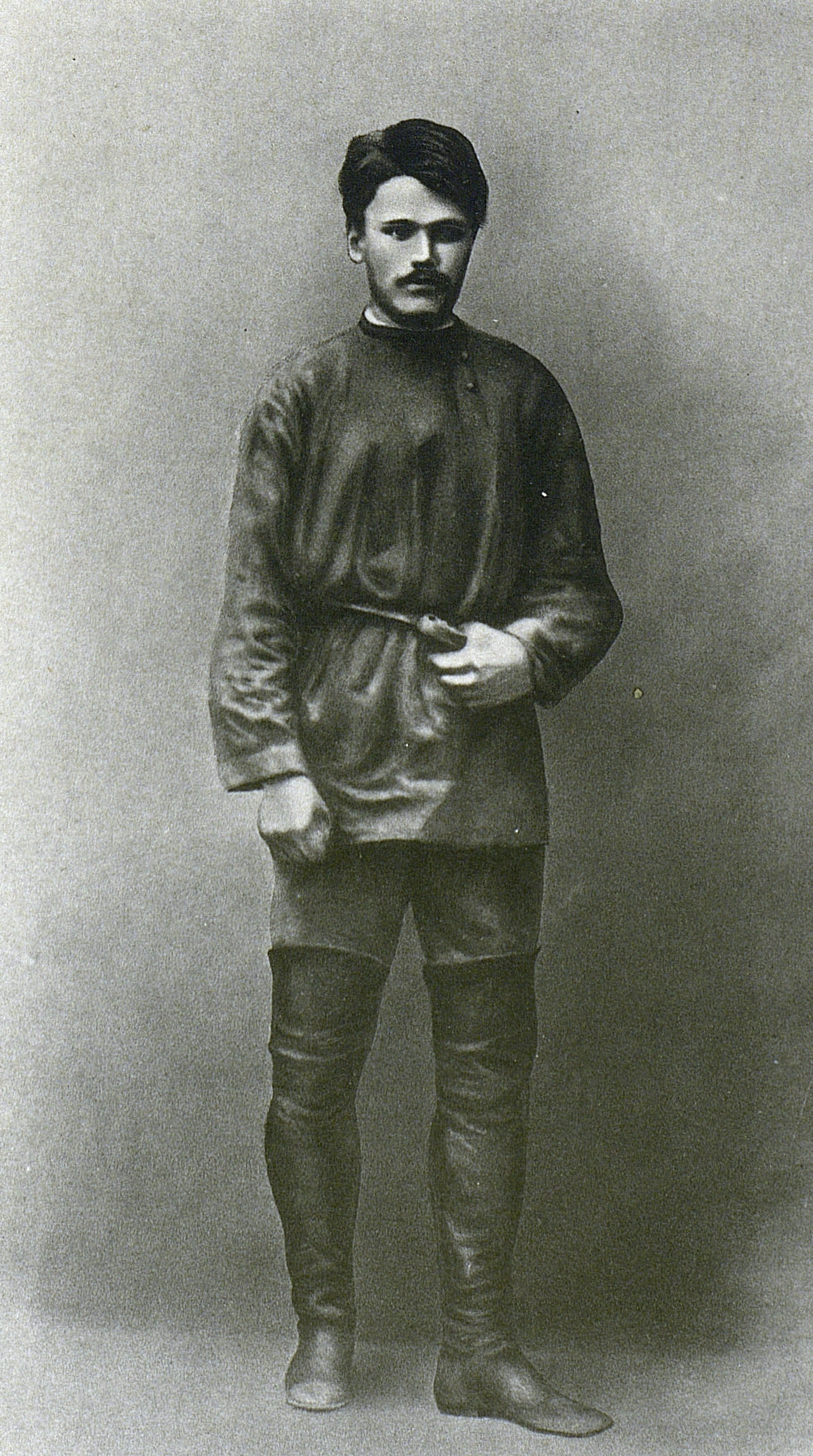 Georgij Plechanov